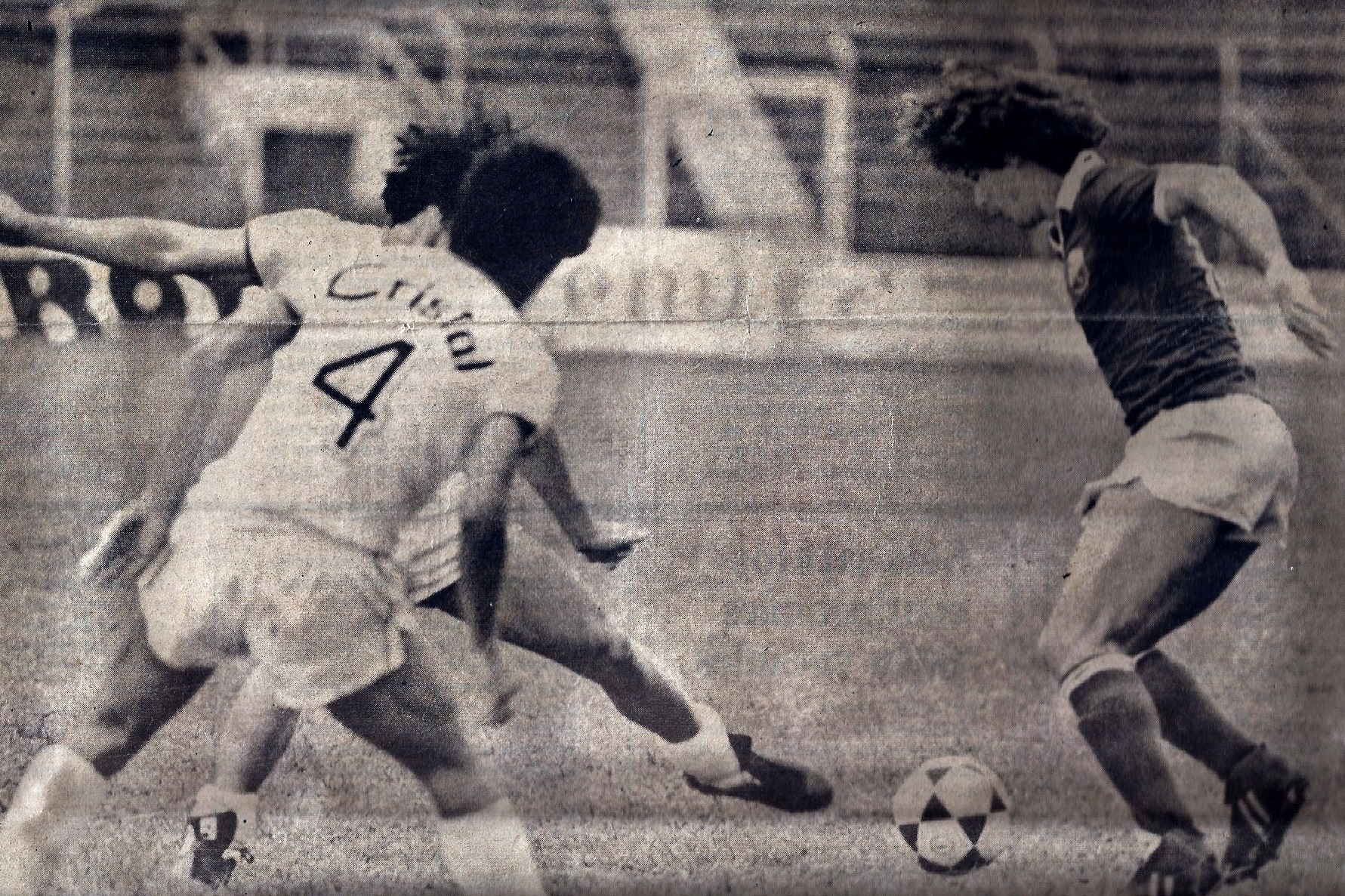 Cristino Kytty Centurion en plena accion futbolistica con el equipo del Deportivo Cali